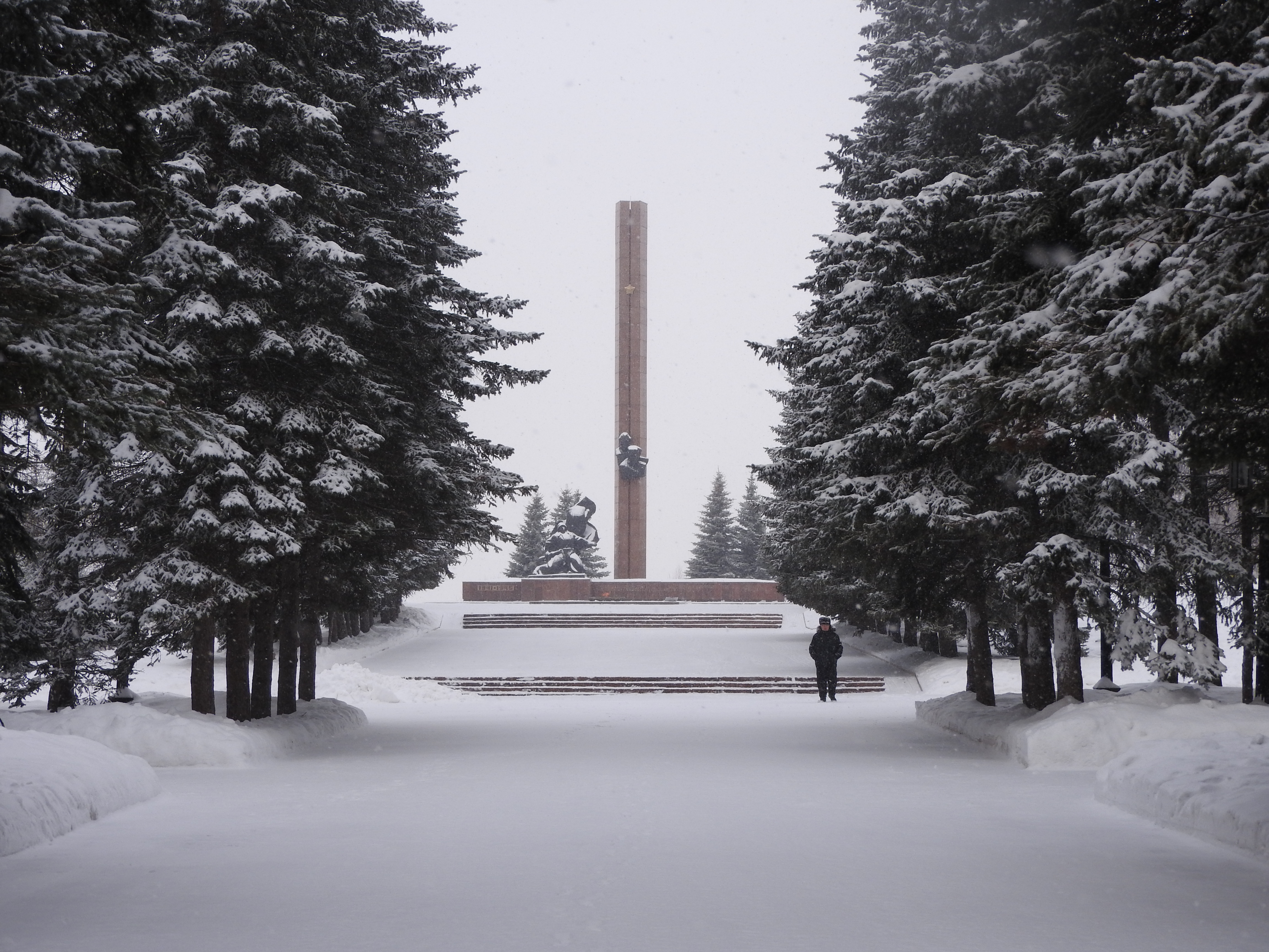 Парк Победы, Уфа